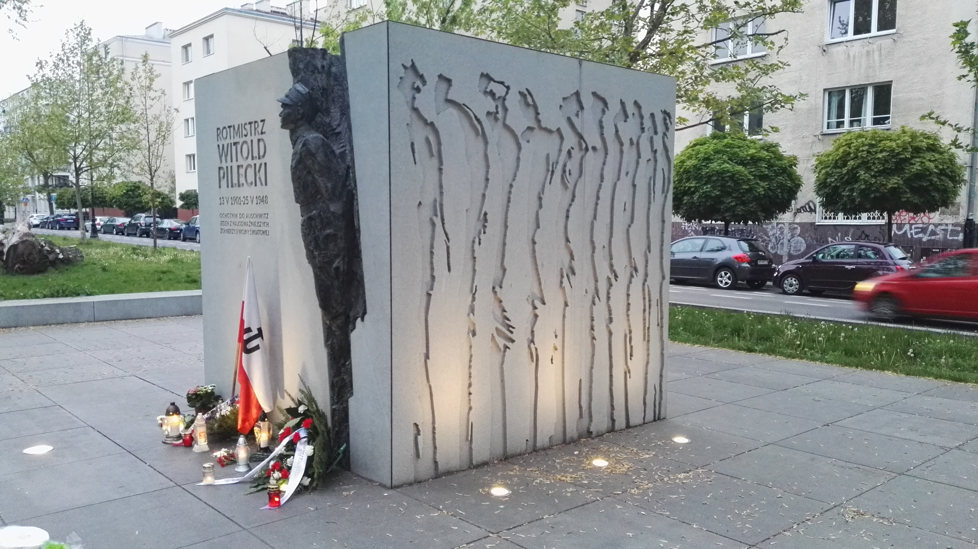 Pomnik Witolda Pileckiego w Warszawie 13.05.2020 w rocznicę urodzin